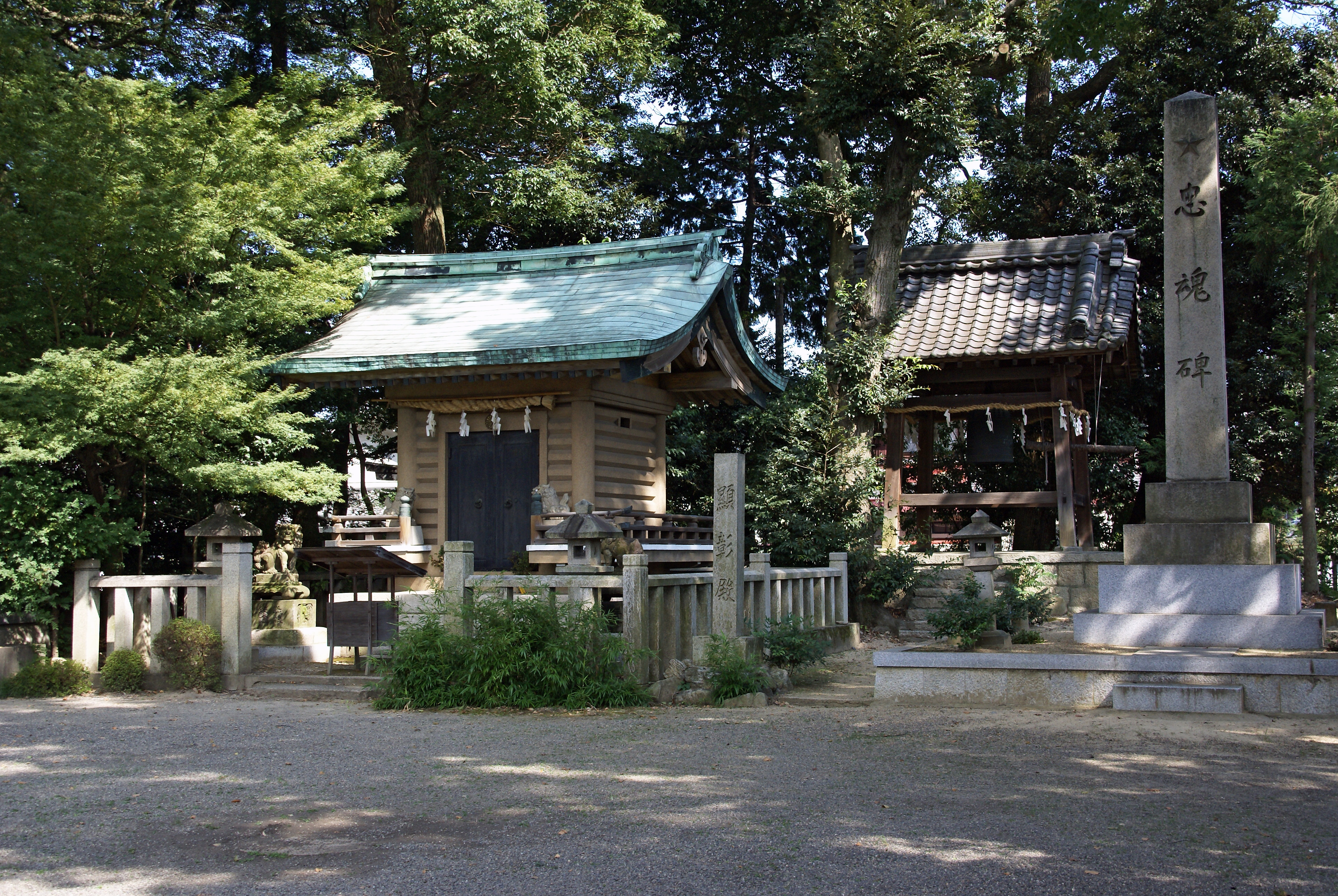 Katsube-jinja in Moriyama, Shiga prefecture, Japan